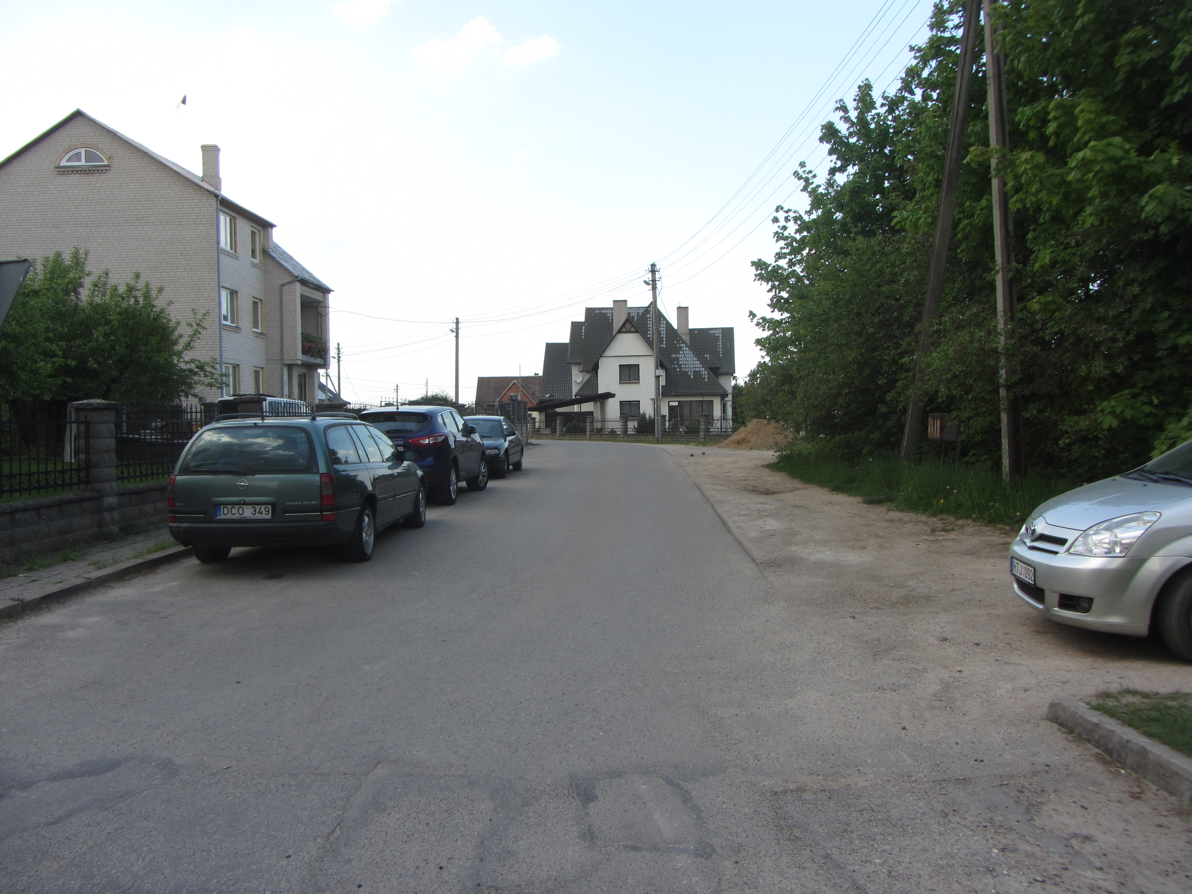 Atkočiškės, Lithuania